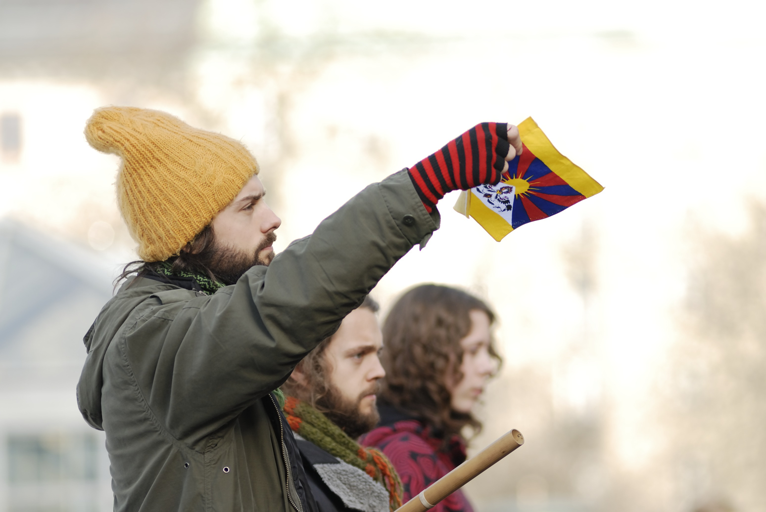 Pro Tibetan protest in Stockholm Sweden